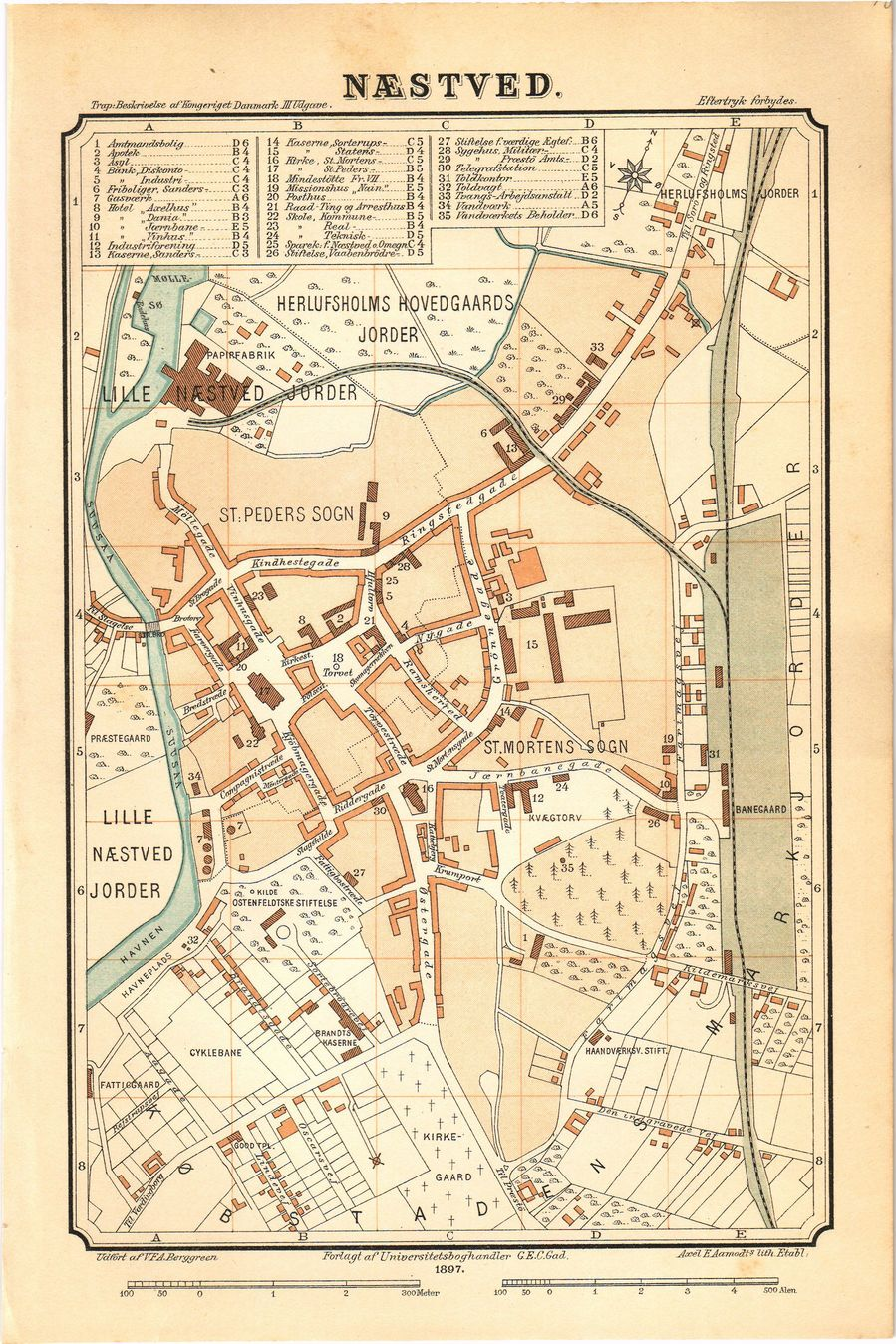 Kort over købstaden Næstved 1897